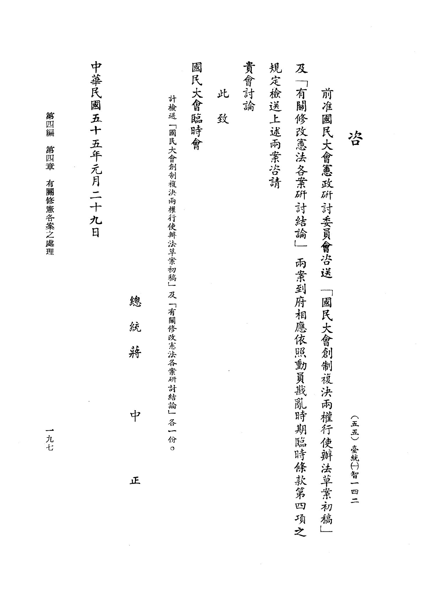 (五五)台统(一)智一四二，召开国民大会临时会咨文